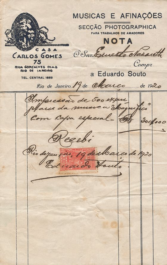 Nota fiscal emitida pela Casa Carlos Gomes, em nome de Eduardo Souto, pelo recebimento da quantia de 300$000 para impressão da peça "Magnífico" do compositor Ernesto Nazareth. Texto: Impressão de 500 exem-/plares da música "Magnífico" / Com capa especial /[assinatura] 300$000 / Recebi / Rio de janeiro, 19 de Março de 1920 / Eduardo Souto." Acervo Ernesto Nazareth do Instituto Moreira Salles (IMS) do Rio de Janeiro